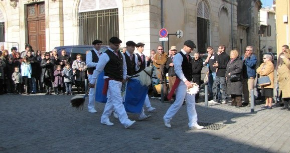 Le Chevalet de Cournonterral (Hérault) lors de sa première sortie, en février 2011.